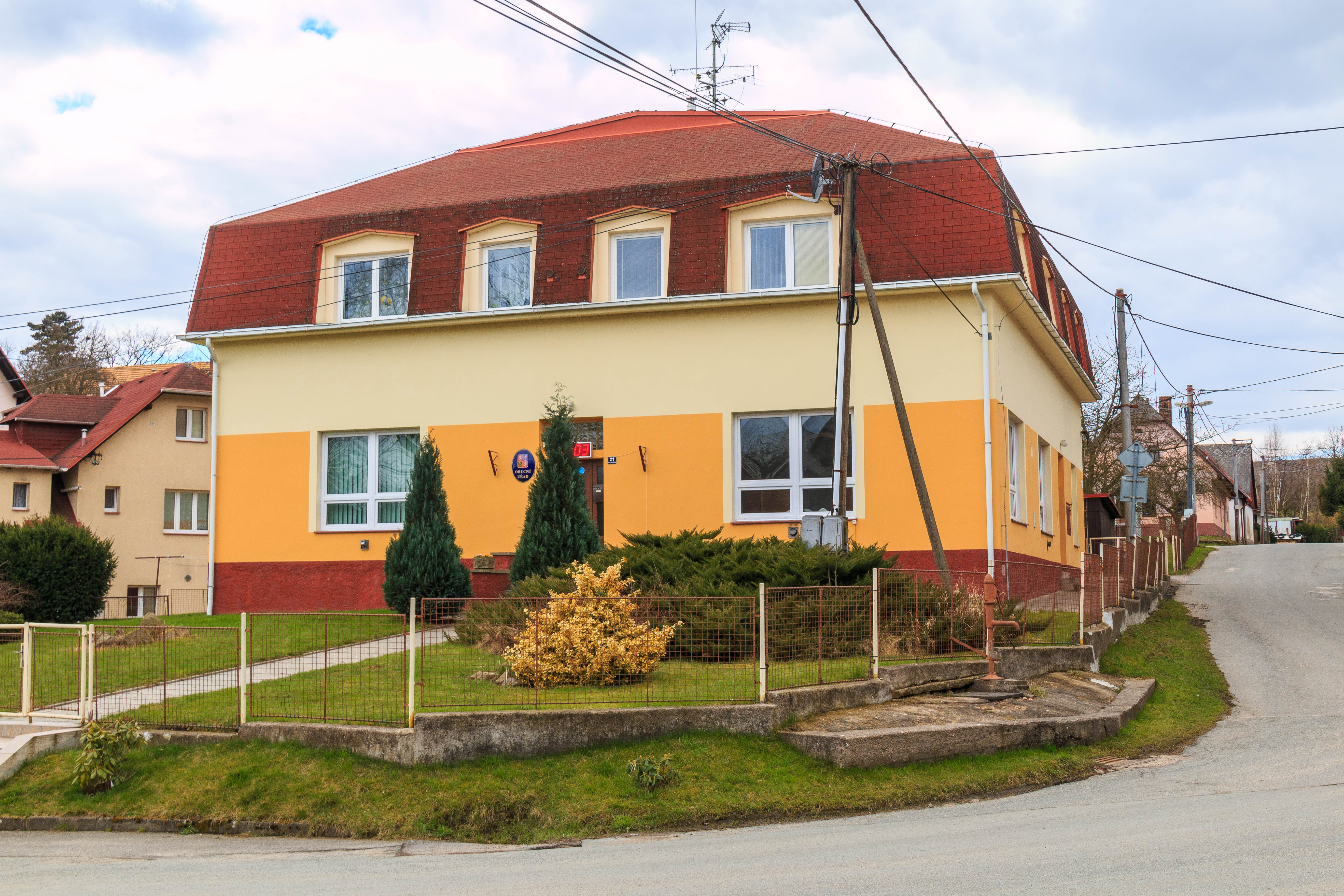 Lhota pod Hořičkami čp. 45